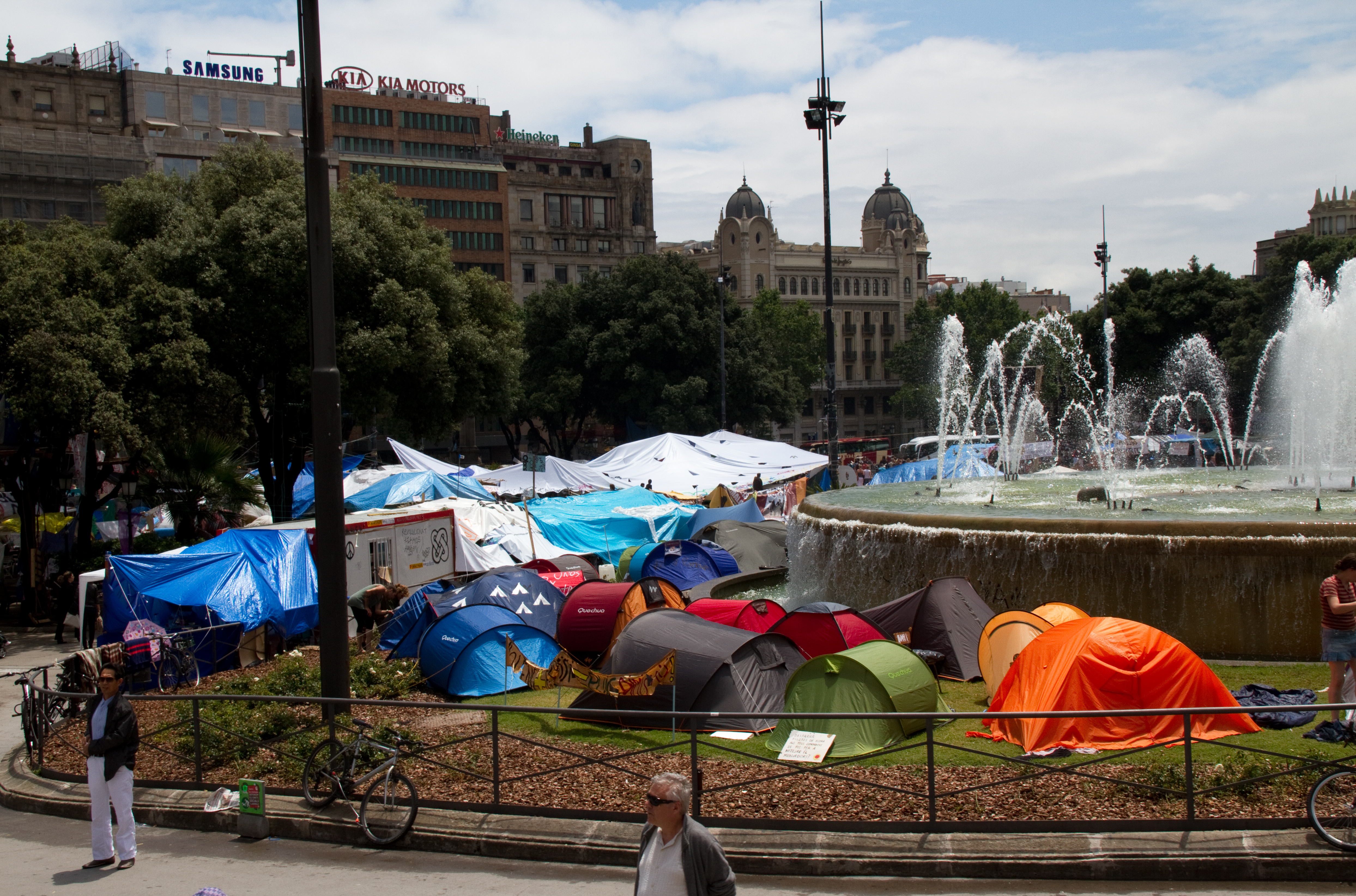 Placa de Catalunya